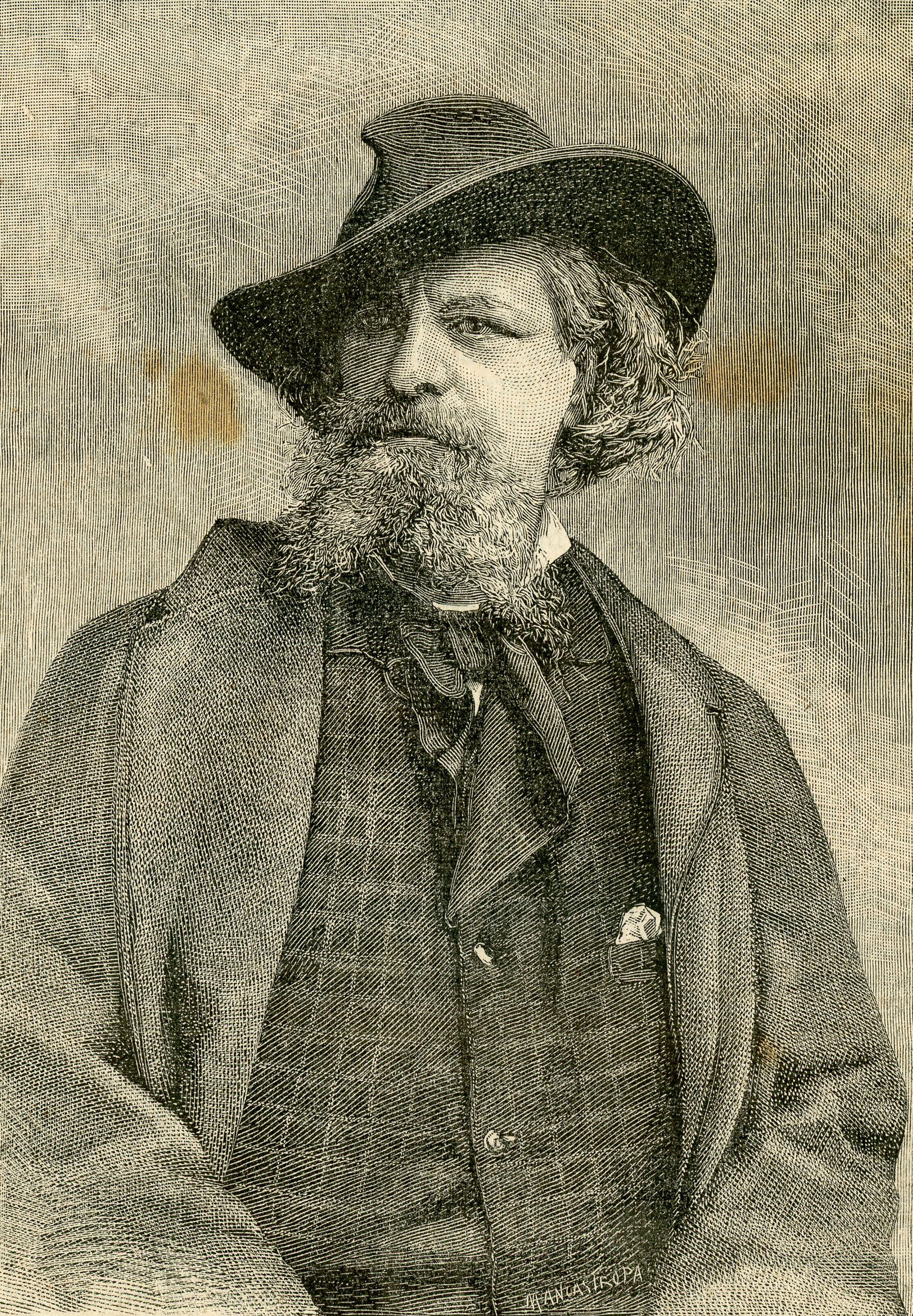 Il pittore Giulio Carlini (xilografia).